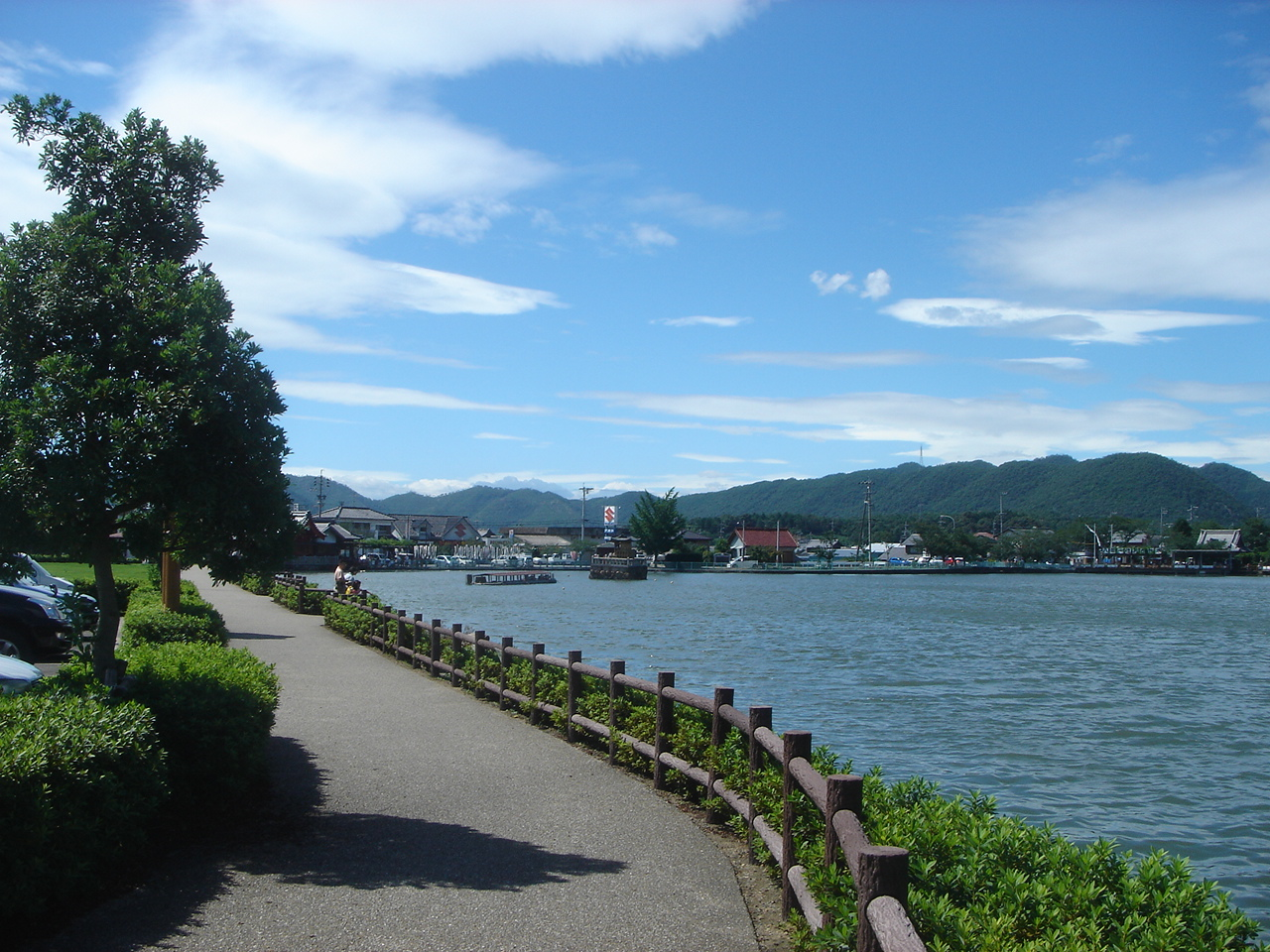 Ogase Ike(苧ヶ瀬池),Kakamigahara,Gifu,Japan(岐阜県各務原市)で撮影。